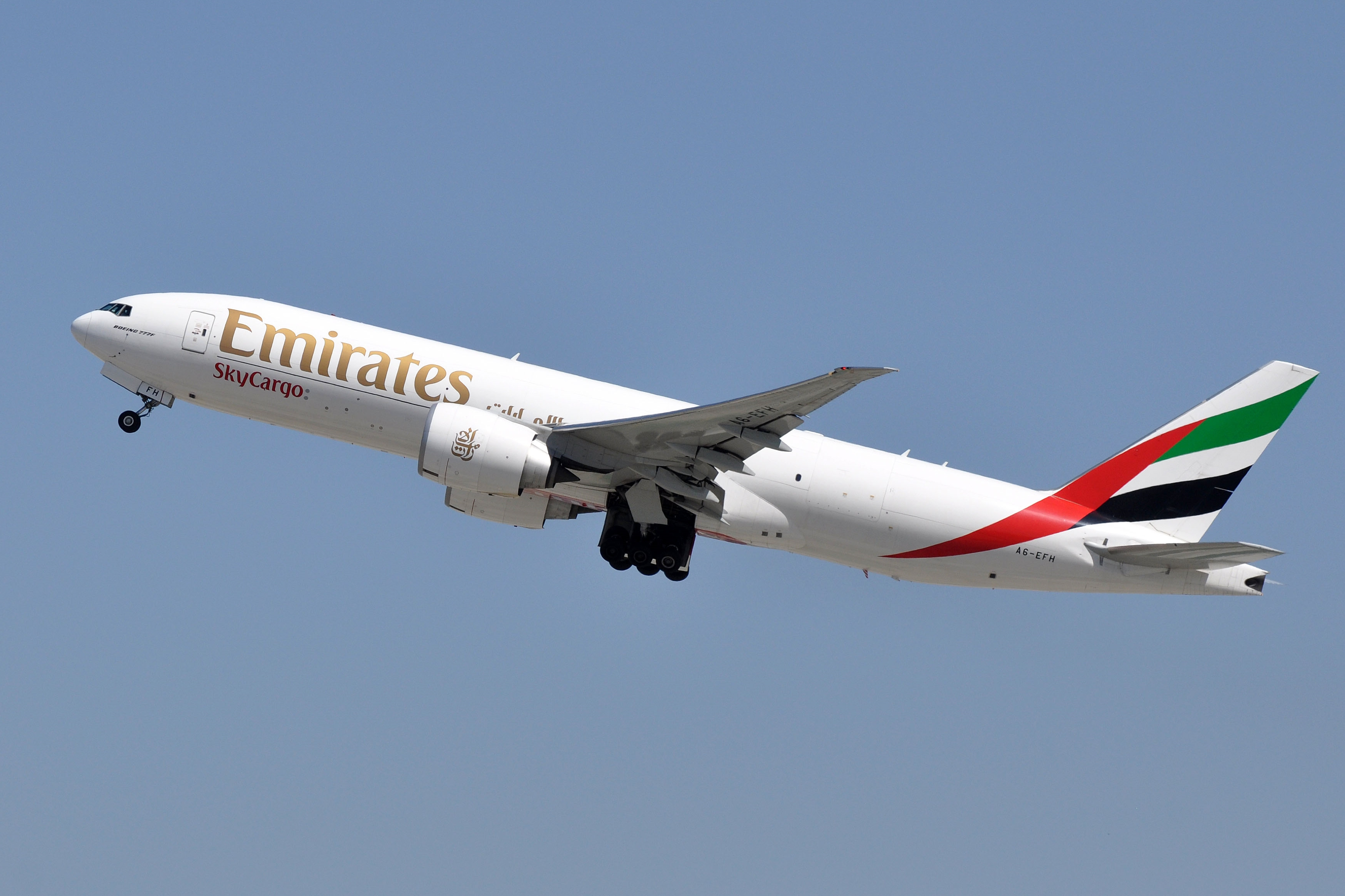 MSN 35608 LN 1046 B777-F1H EMIRATES LAX AIRPORT